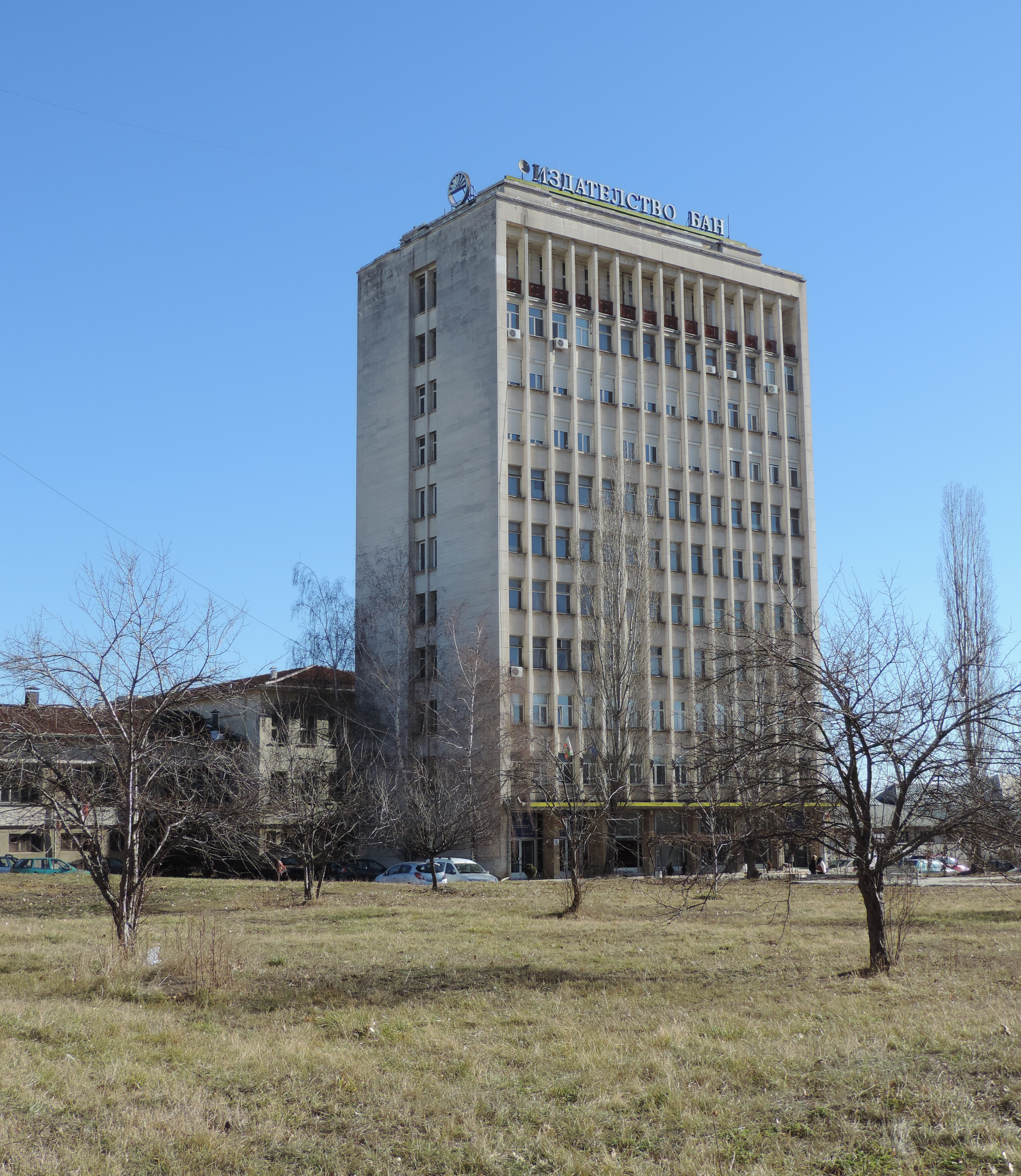 Блок 6 в Комплекса на БАН "4-ти километър": Сградата на Академично издателство "Проф. Марин Дринов" и Института за етнология и фолклористика с Етнографски музей